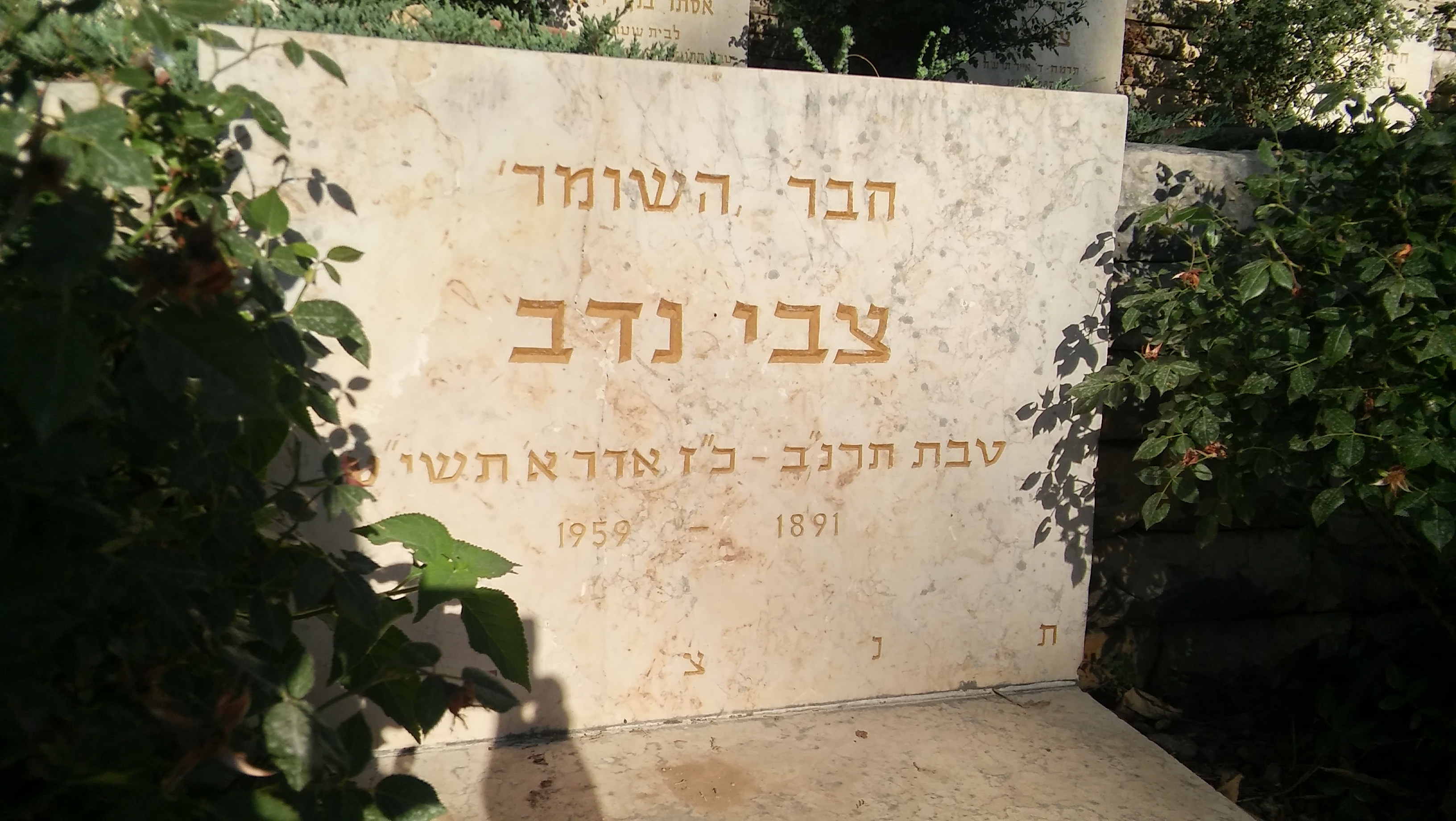 המצבה של צבי נדב בחלקת השומר בבית הקברות של כפר גלעדי